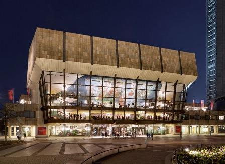 Gewandhaus zu Leipzig (© Jens Gerber)